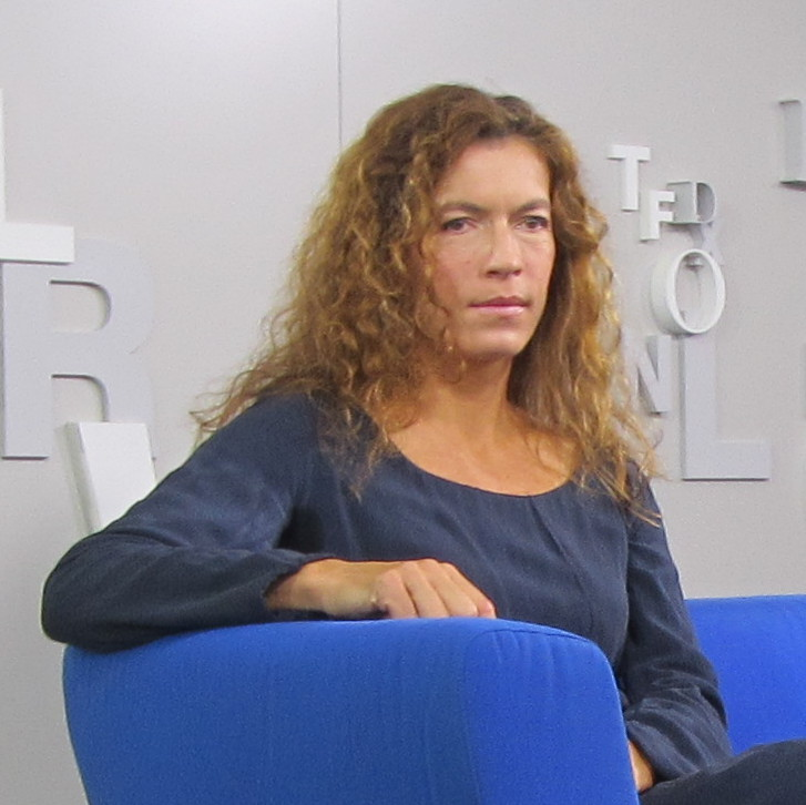 Schriftstellerin Anne Weber auf dem Blauen Sofa der Frankfurter Buchmesse, ihren Roman Tal der Herrlichkeiten vorstellend